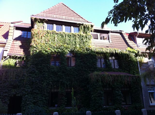 Haus Bücking in Bremen, Brahmsstraße 5Das abgebildete Objekt ist ein geschütztes Kulturdenkmal in der Freien Hansestadt Bremen, mit der Nr. 0212 beim Landesamt für Denkmalpflege registriert.